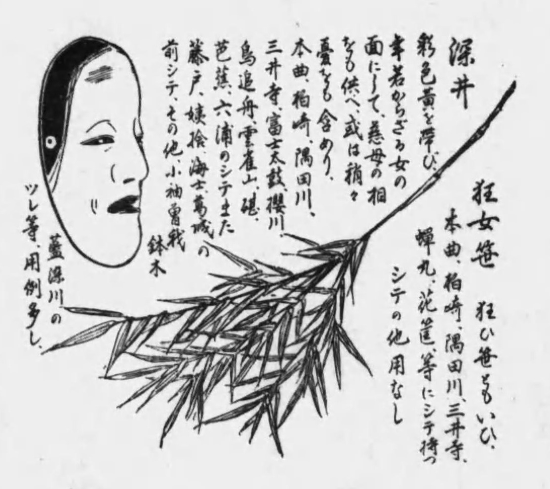 観世左近『氷室・善界・芭蕉・百万・舟弁慶』中、「百万」の項目より、能面・深井と狂女笹（狂い笹）